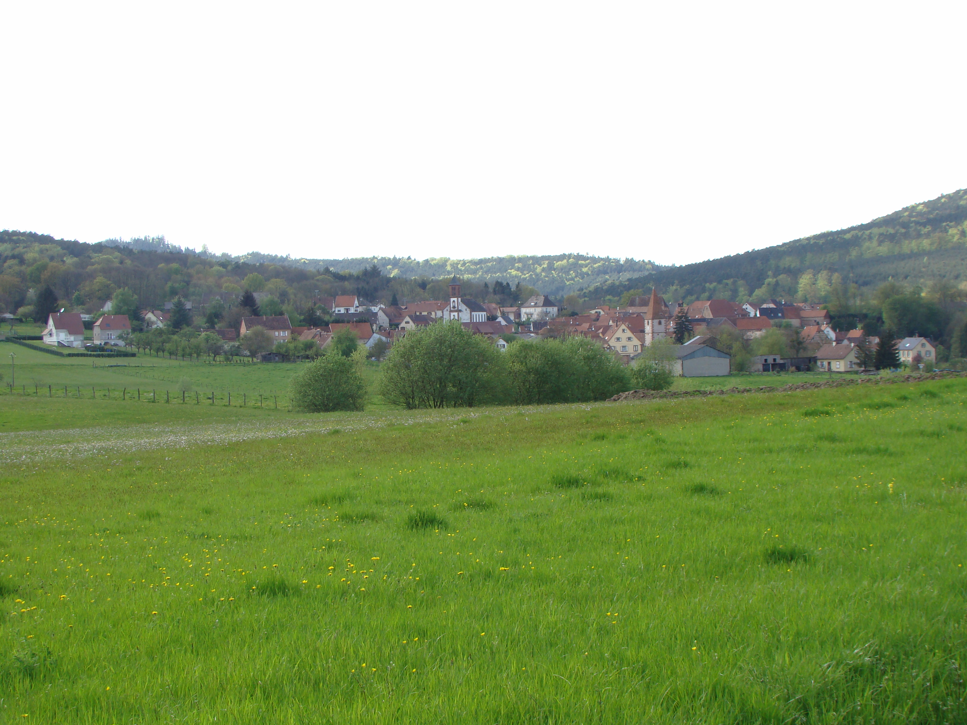 Vue générale du village depuis l'est.